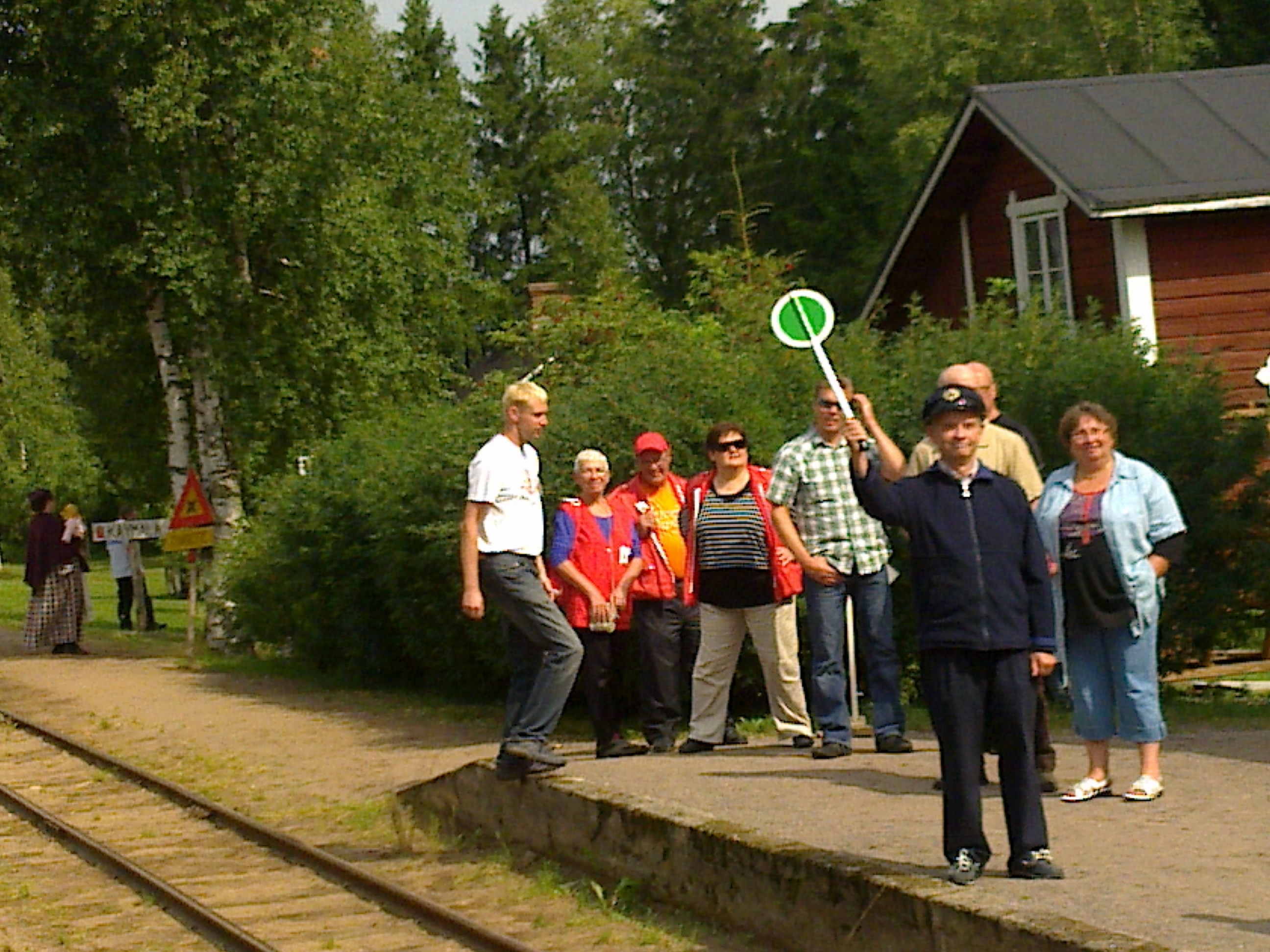 KVR-vaunujen juhlalähetys matkaan